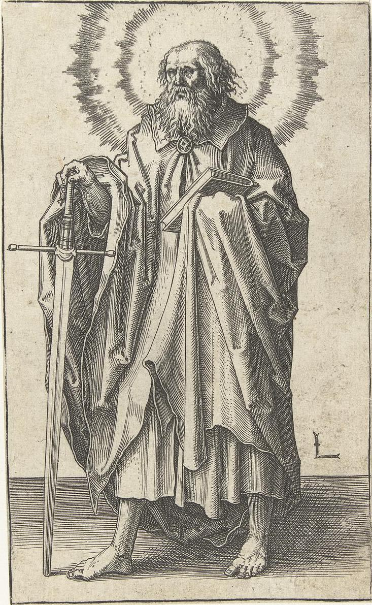 De apostel Paulus (uit de serie Christus en de apostelen). engraving. 11,4 × 6,9 cm. Amsterdam, Rijksmuseum Amsterdam. Inventory number RP-P-OB-1667. Herkomst onbekend.